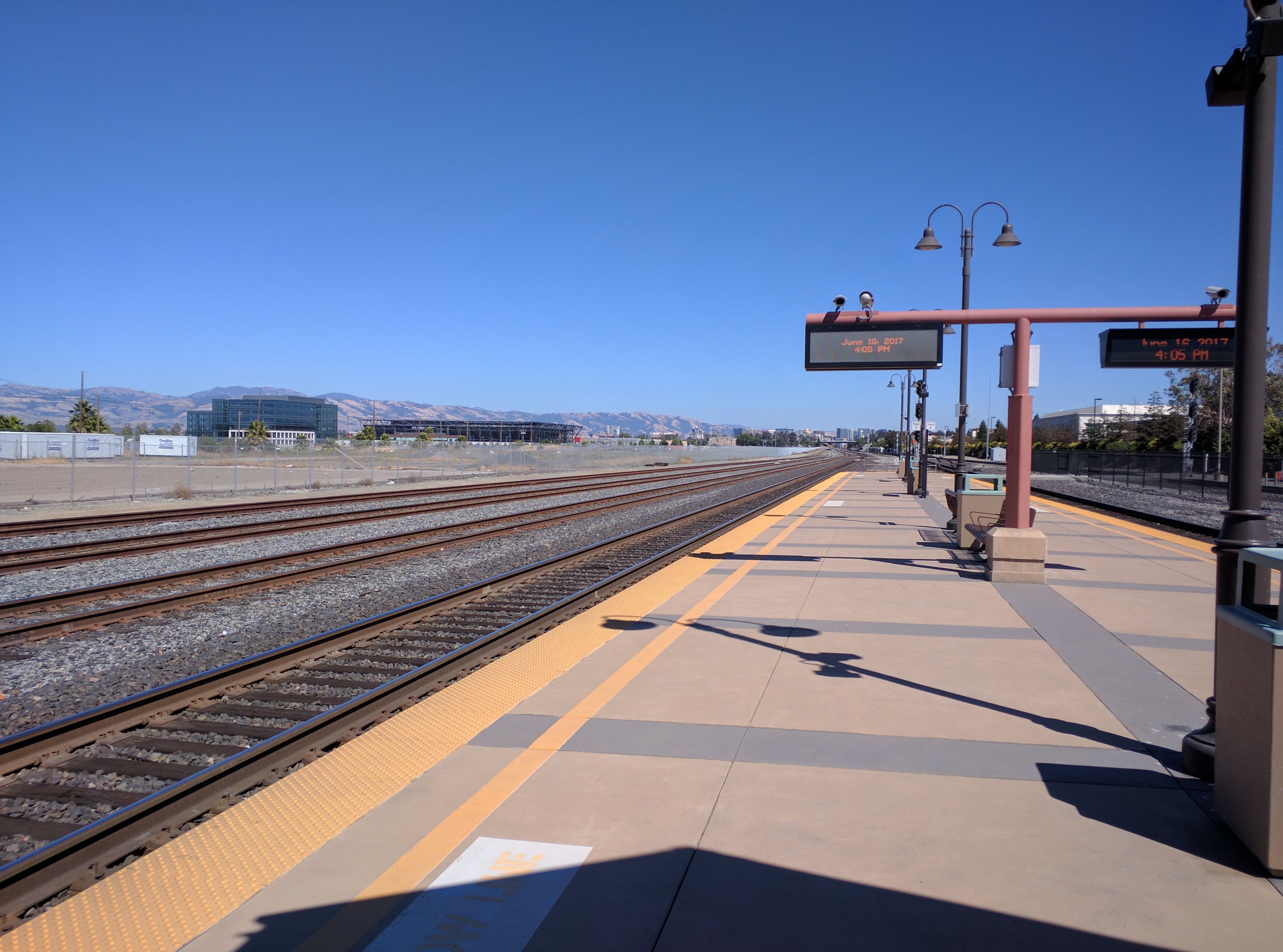 Santa Clara station